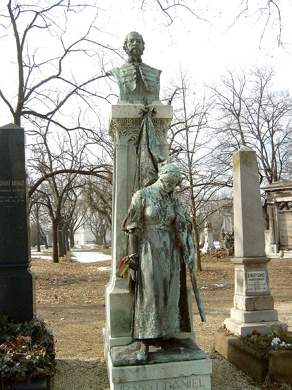 Irányi Dániel sírja Budapesten. Kerepesi temető: 29-1-8. Kallós Ede (1866–1950) szobrászművész, illetve Bálint Zoltán (1871–1939) és Jámbor Lajos (1869–1955) építészek alkotása